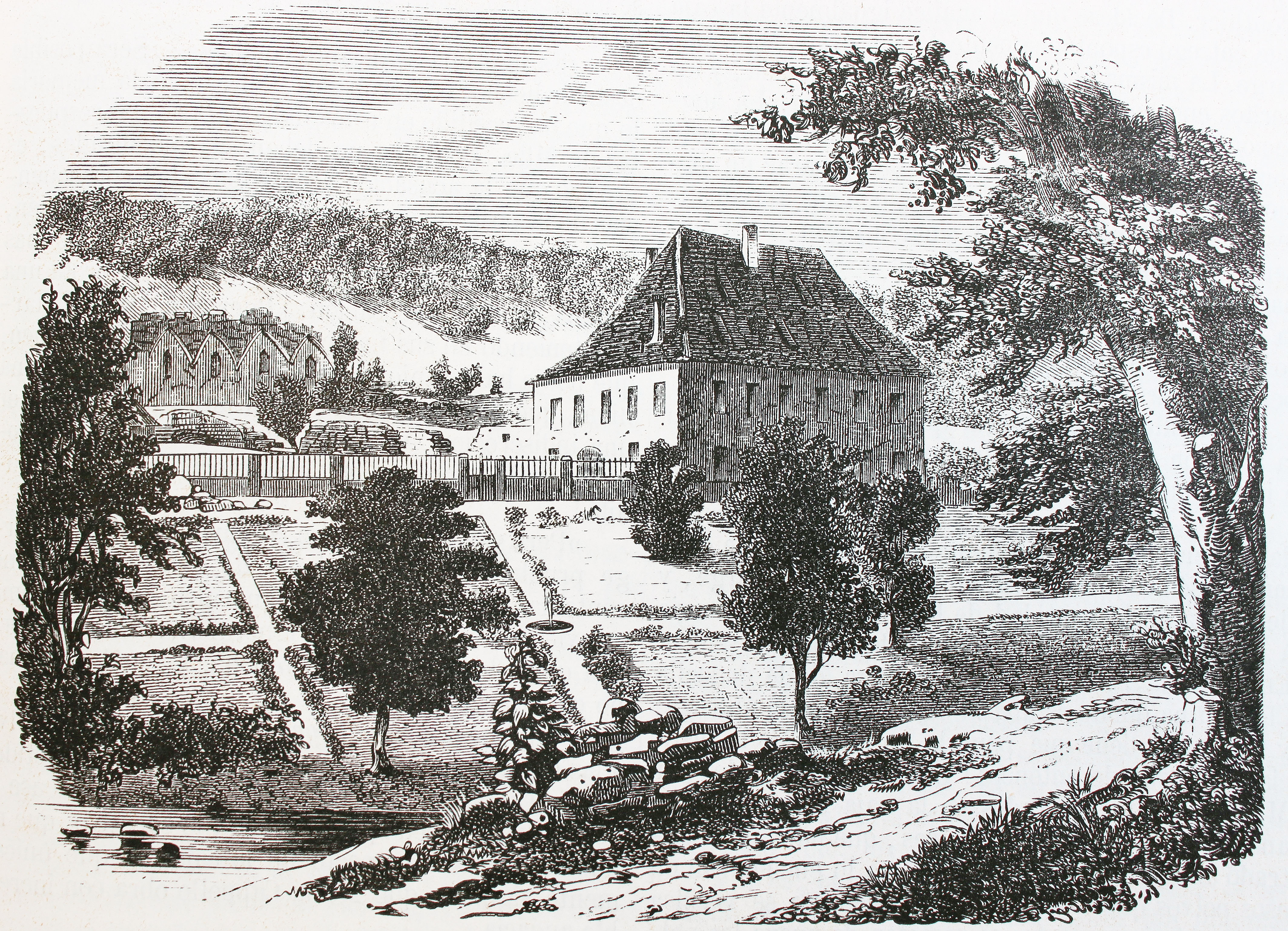 Ilustraciones de la obra : Anales dramáticos del crimen ó Causas célebres españolas y estranjeras [sic] / estractadas [sic] de los originales y traducidas, bajo la dirección de José de Vicente y Caravantes. - Madrid : Imprenta de Fernando Gaspar [etc.], 1858-1866. - Ed. il. con grabados...